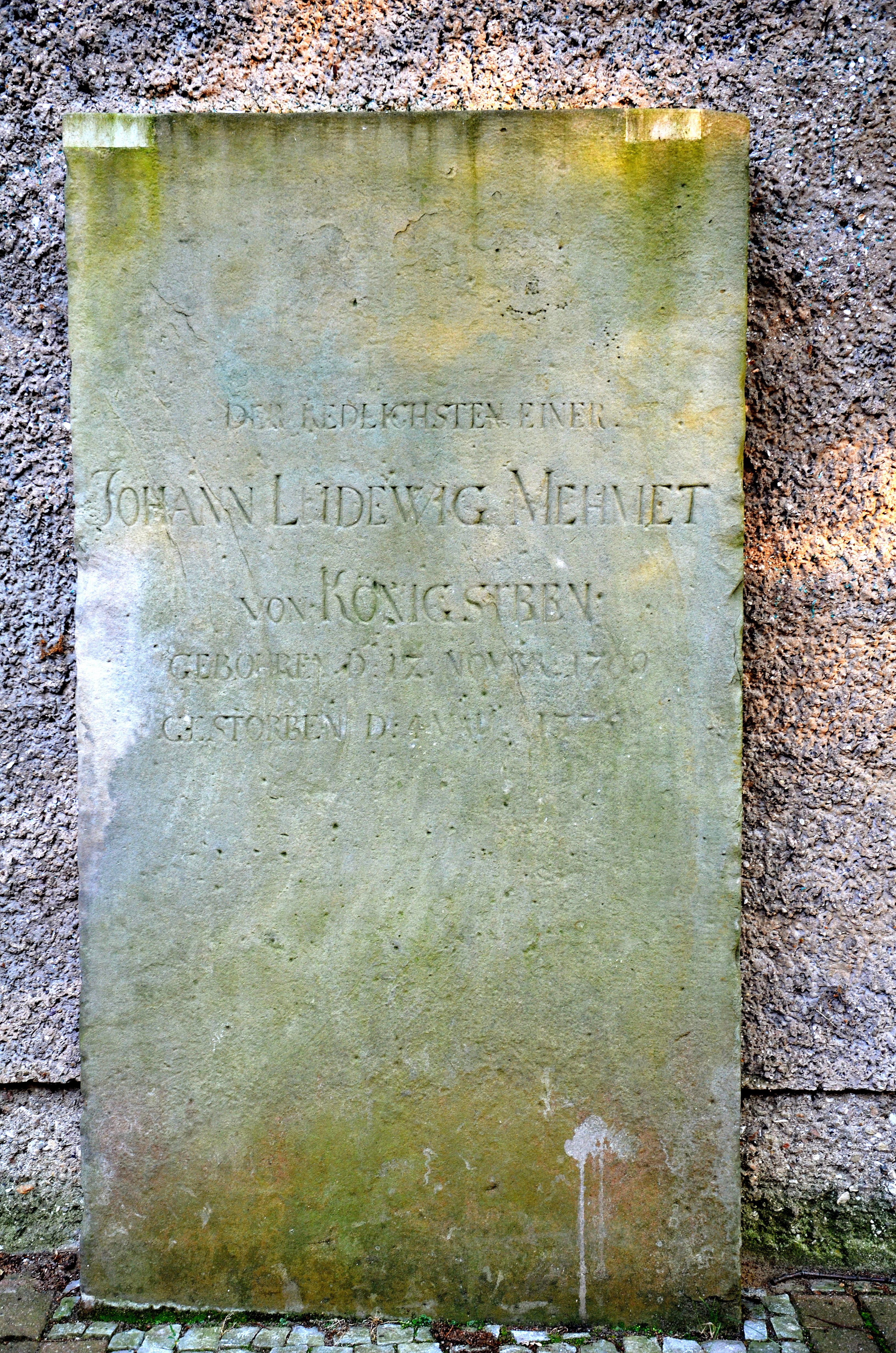 Hochkant an den Aussenmauern des Kirchenschiffes der während der Luftangriffe auf Hannover 1943 zerstörten, 1949 als Notkirche wieder aufgebauten St. Petri-Kirche in Hannover-Döhren aufgerichtete Grabplatte für den ältesten Sohn des ehemaligen sogenannten Beuteturken, Ludwig Maximilian Mehmet von Königstreu, mit der folgenden Inschrift: „DER REDLICHSTEN EINER / JOHANN LUDEWIG MEHMET / VON KÖNIGSTREU / GEBOHREN D. 17. NOVBR. 1709 / GESTORBEN D: 4 MAI 1775“ ...